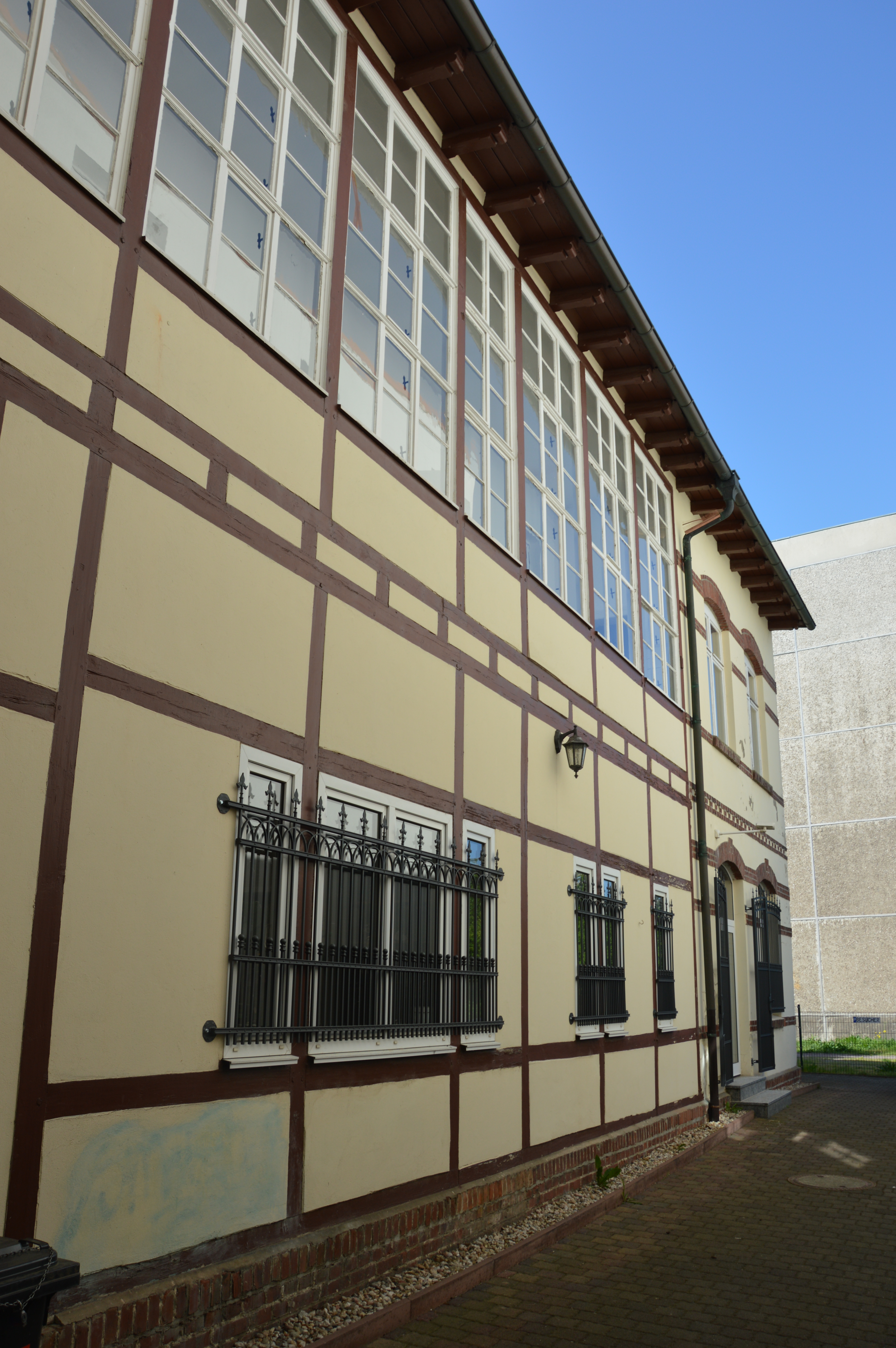 Johannesstraße 6 in Dessau, Hofgebäude